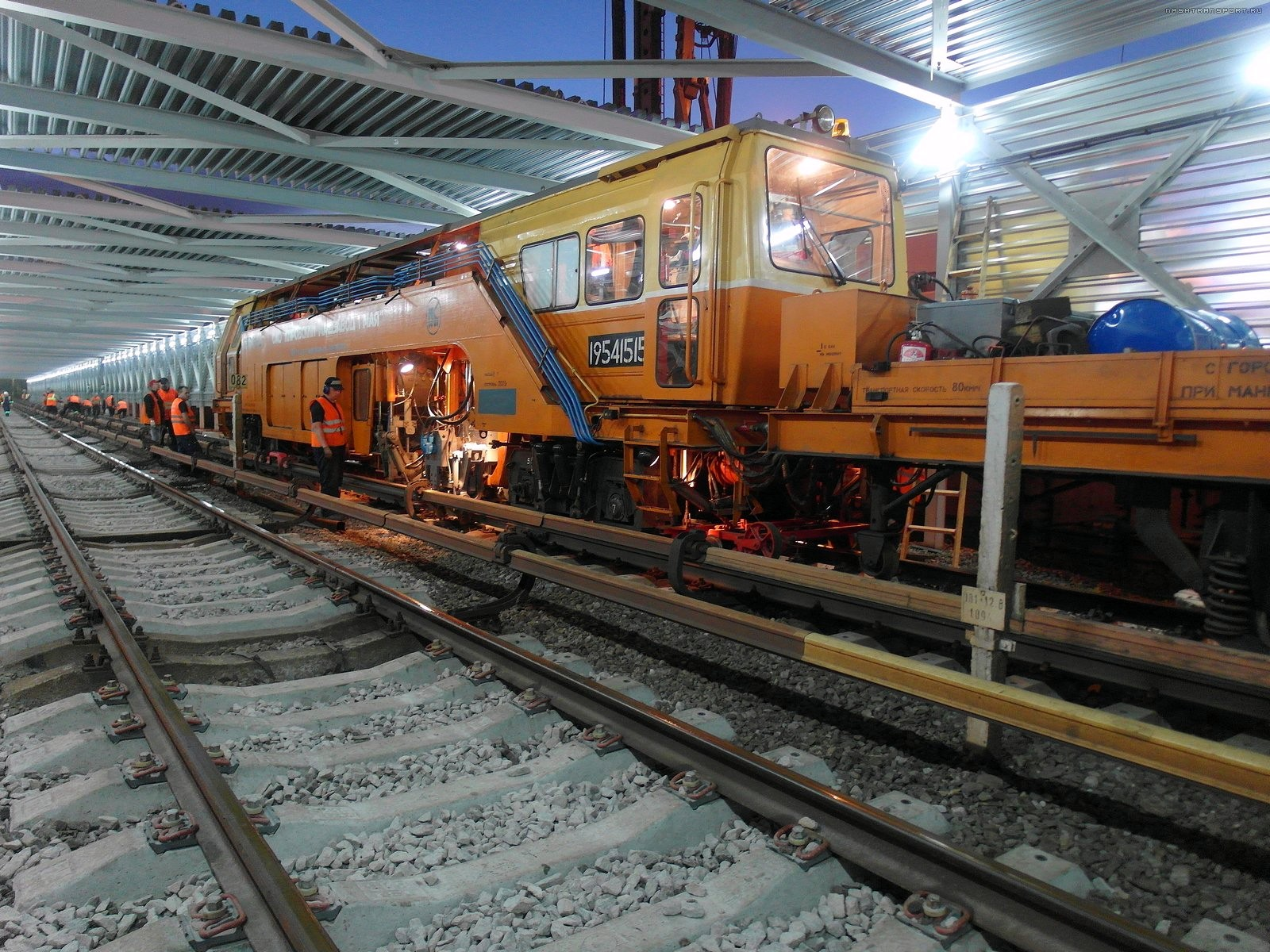 Путевая машина в зоне строительства станции Технопарк